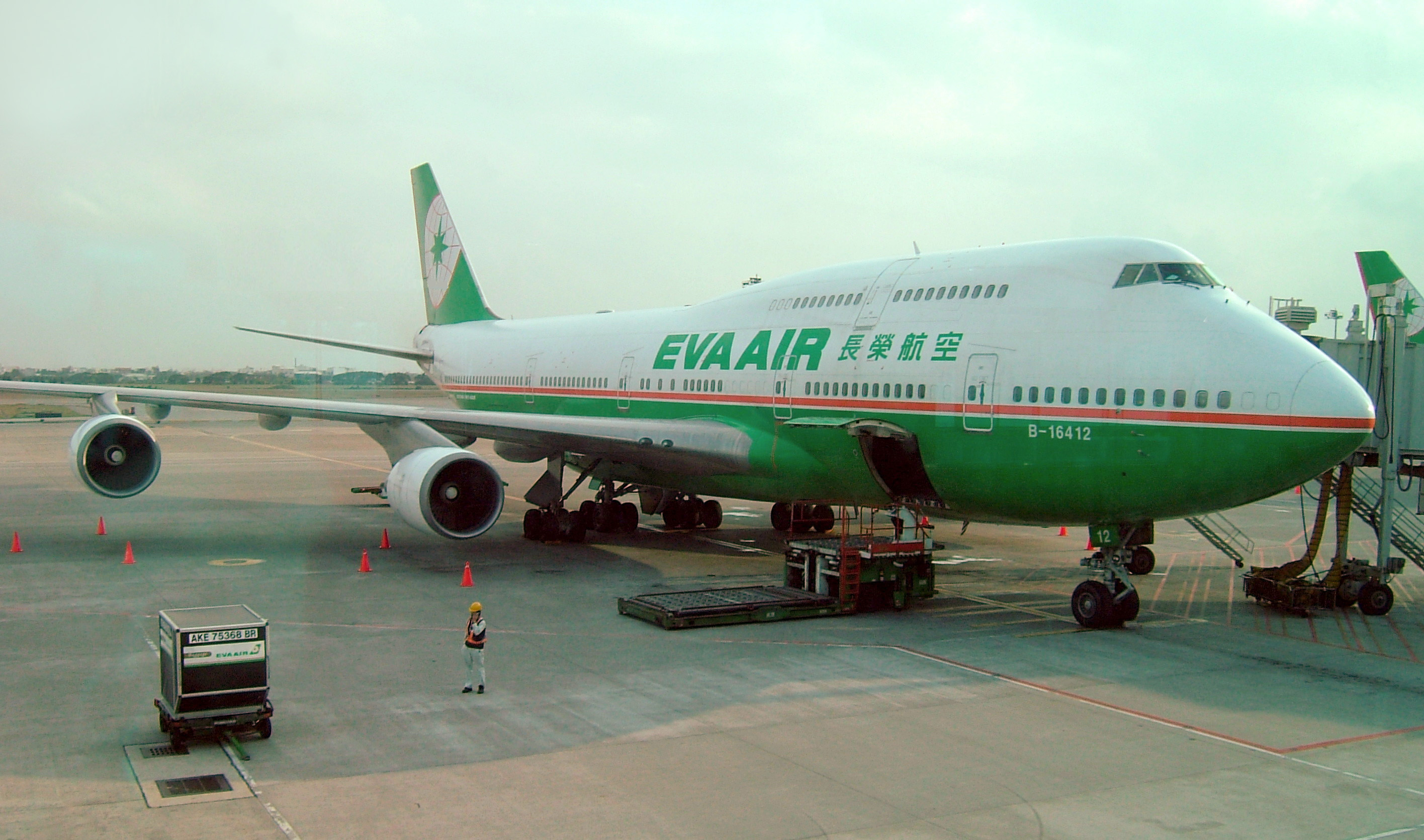 EVA 747